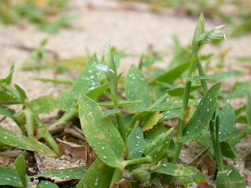 Thuarea involuta(Poaceae) Japanese name:Kuroiwazasa Date;2004,08,12;Hyakuna,Okinawajima Island ,Okinawa prefecture, Japan Author;Keisotyo